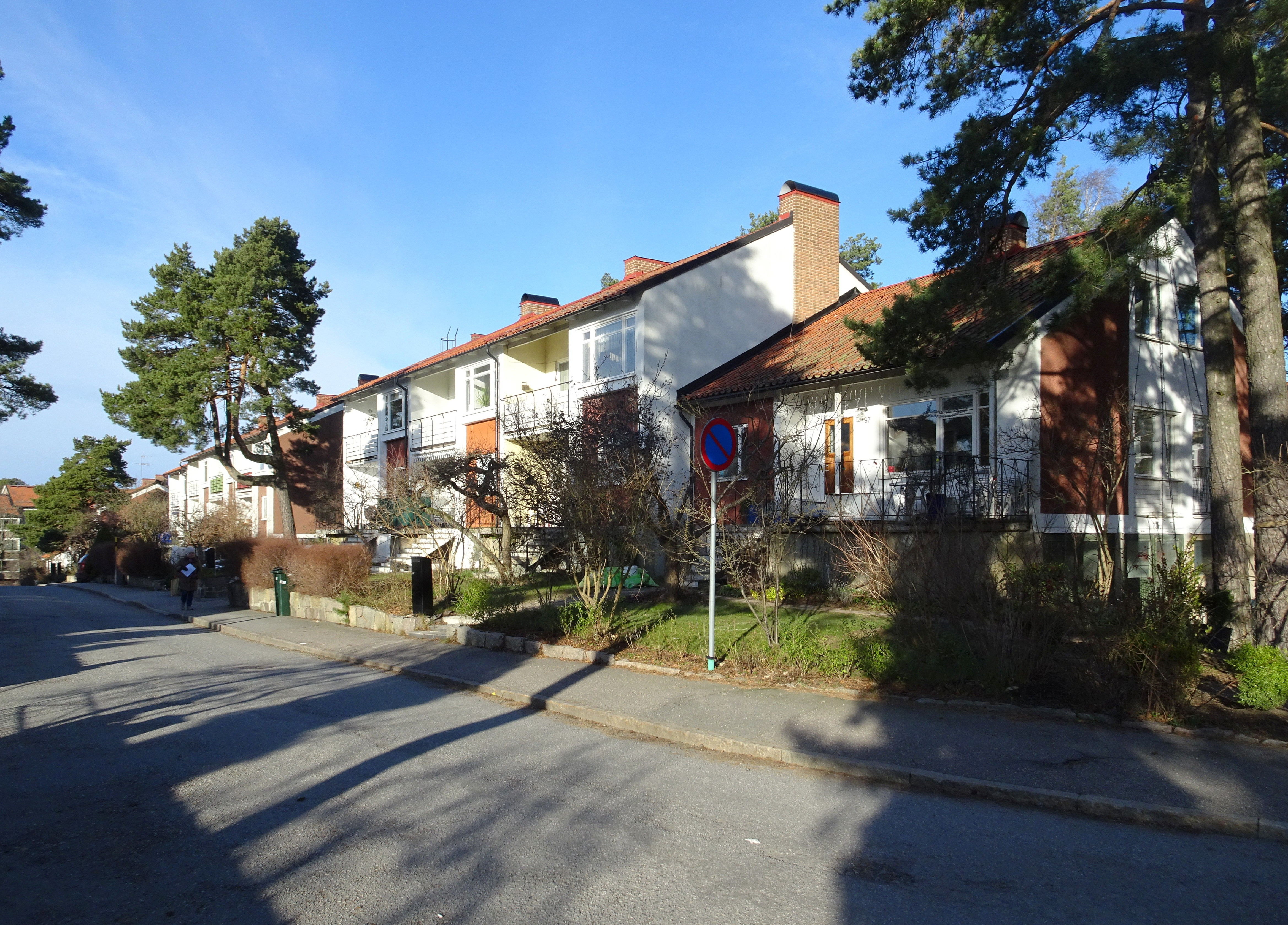 Vivstavarvsvägens radhusområde, byggår 1952, arkitekt Erik Dahl (Vivstavarvsvägen mot västerut, nr 197 t.h.)